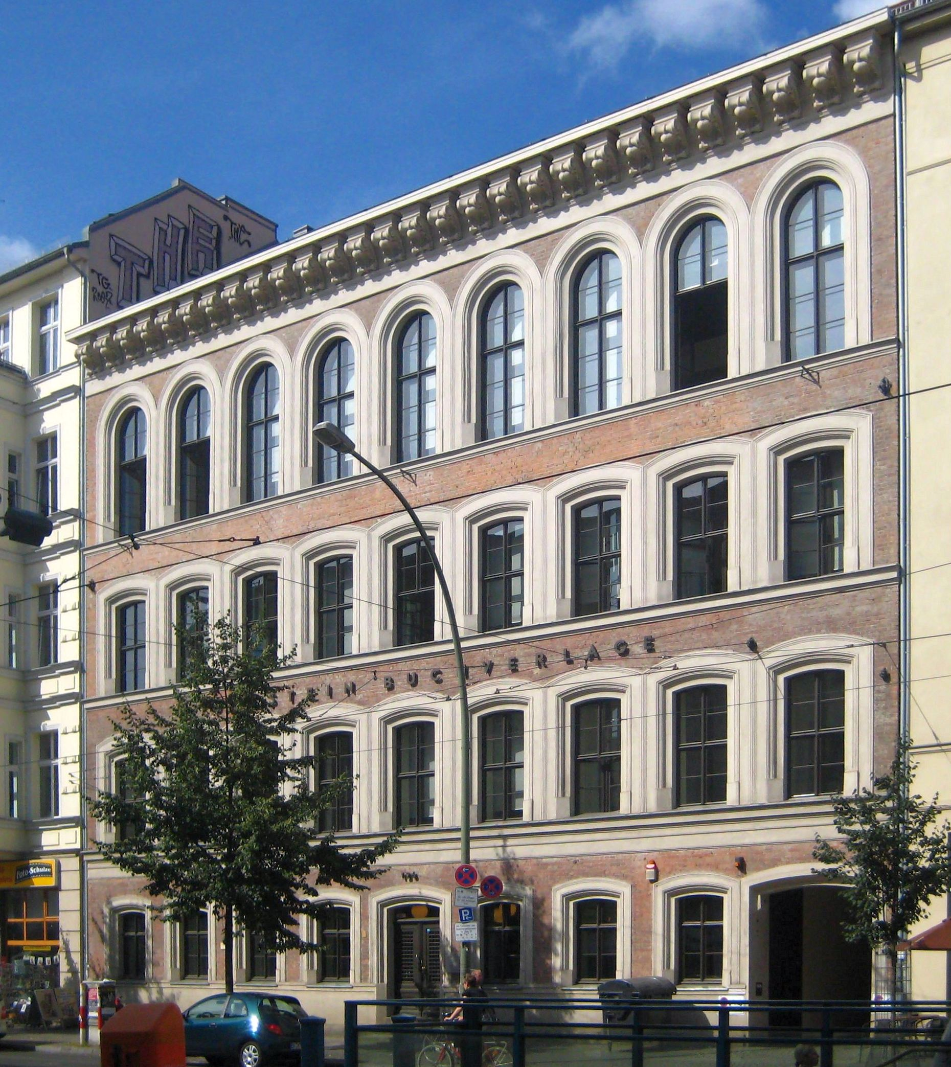 Das ehemalige Friedrichsgymnasium in der Friedrichstraße 126 in Berlin-Mitte, seit 2004 Zentrale der Ullstein Buchverlage, die von München umgesiedelt ist. Die 1848-1849 als erste Schule der Friedrich-Wilhelm-Stadt errichtete Anlage bestand ursprünglich aus einem Vorder- und einem Hintergebäude; ein zweites Hintergebäude wurde 1889 erbaut. Das Vorderhaus ist ein nüchterner, viergeschossiger Klinkerverblendbau mit neun Achsen. Die hohen Rundbogenfenster im vierten Stockwerk verweisen auf die Lage der früheren Schulaula. Im zweiten Hintergebäude ist der ehemalige Musiksaal mit fein gearbeiteter Holzdecke erhalten geblieben. Das Gebäude diente in der DDR-Zeit als Sitz der Fach-/Berufsschule für Gaststätten und Hotelwesen. Danach war hier das Oberstufenzentrum Verkehr, Wohnungswirtschaft, Steuer untergebracht. Für die Ullstein Buchverlage wurde der Komplex 2003-2004 nach Plänen des englischen Architekten David Chipperfield umgebaut; das Hintergebäude wurde dabei um zwei Etagen aufgestockt. Der gesamte Komplex ist als Gesamtanlage denkmalgeschützt.